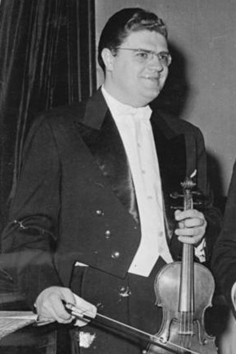 Title: Prag, internationale Musikfestspiele, Franz Konwitschny Factual corrections and alternative descriptions are encouraged separately from the original description. Additionally errors can be reported at this page to inform the Bundesarchiv. Original historic description: Zentralbild-CTK 1.6.57 Sc-I Erfolgreicher Auftritt deutscher Künstler auf dem "Prager Frühling 1957" Franz Konwitschny dirigierte Im Rahmen der zur Zeit in der tschechoslowakischen Hauptstadt stattfindenden internationalen Musikfestspiele "Prager Frühling" wurde ein Konzert des Prager Rundfunk-Sinfonieorchesters unter Leitung von Professor Franz Konwitschny zu einem großen Erfolg. Höhepunkt des Konzerts war die Aufführung von Carl Orffs Kantate "Carmina burana", die erstmalig in der CSR erklang. Professor Konwitschny, Chormeister Professor Kuehn, die tschechoslowakischen Vokalisten Subrtova, Votava, Srunar, sowie der Chor und das Orchester, die Orffs Werk als Ergebnis einer deutsch-tschechoslowakischen Zusammenarbeit in seiner vollen Schönheit erstehen ließen, wurden von dem internationalen Publikum stürmisch gefeiert. (Nähres siehe ADN-Meldung 25-74 v. 1.6.57) UBz: Während einer Konzertpause Von rechts. Klarinettist Oskar Michalik (DDR), der ebenfalls in dem Konzert auftrat, Professor Franz Konwitschny und der Violinist Josef Suk (CSR)."